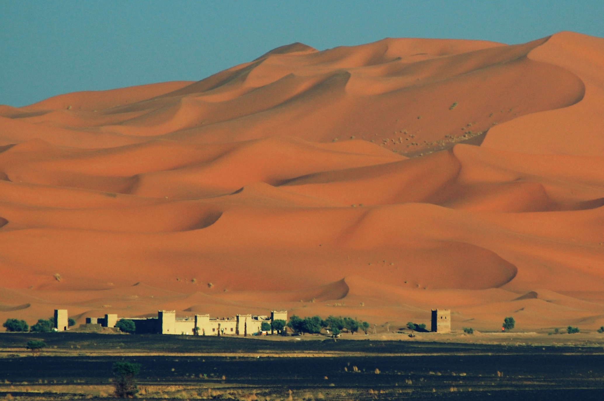 Merzouga, Morocco